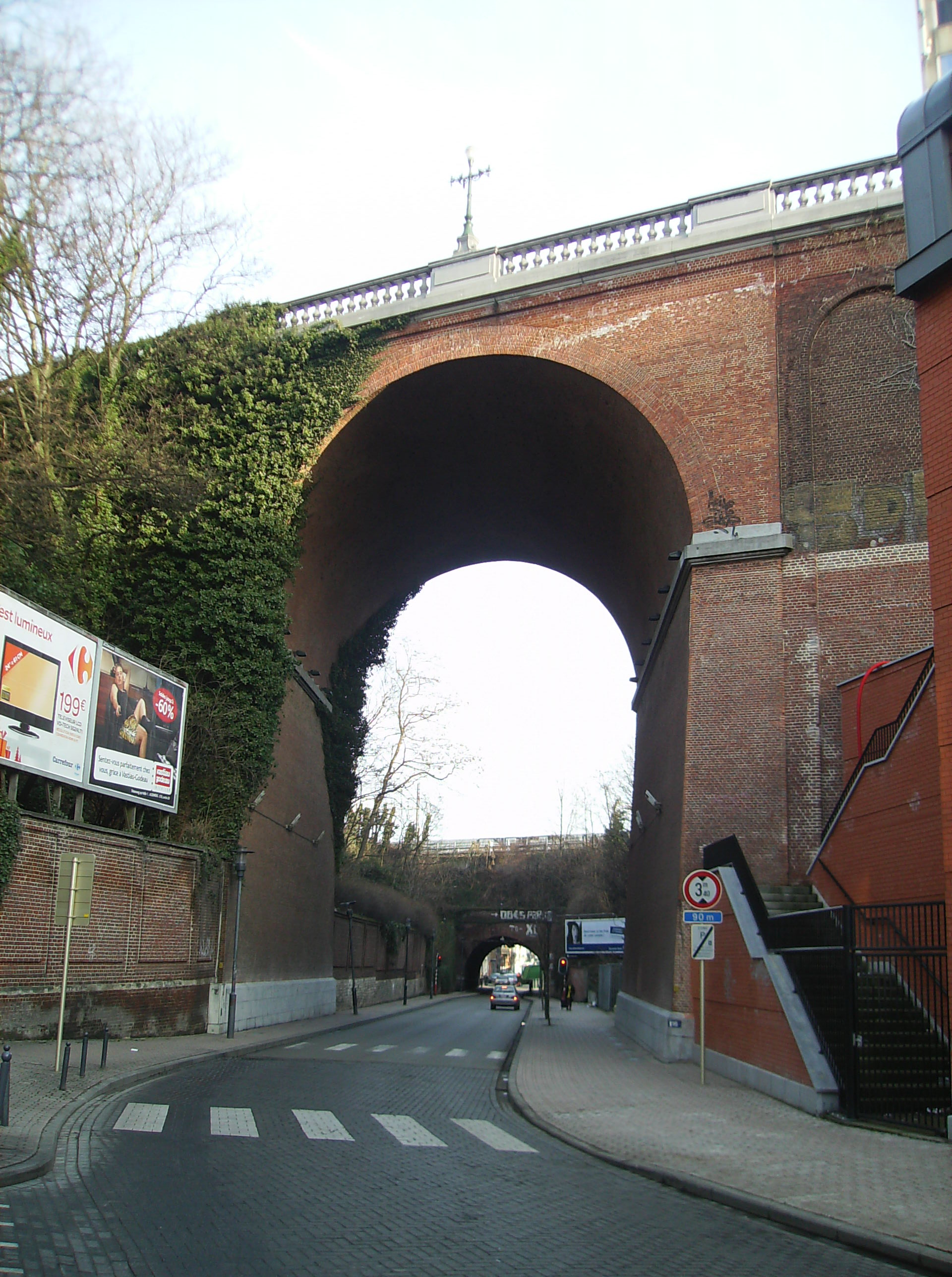 Vue d'ensemble du pont Gray-Couronne